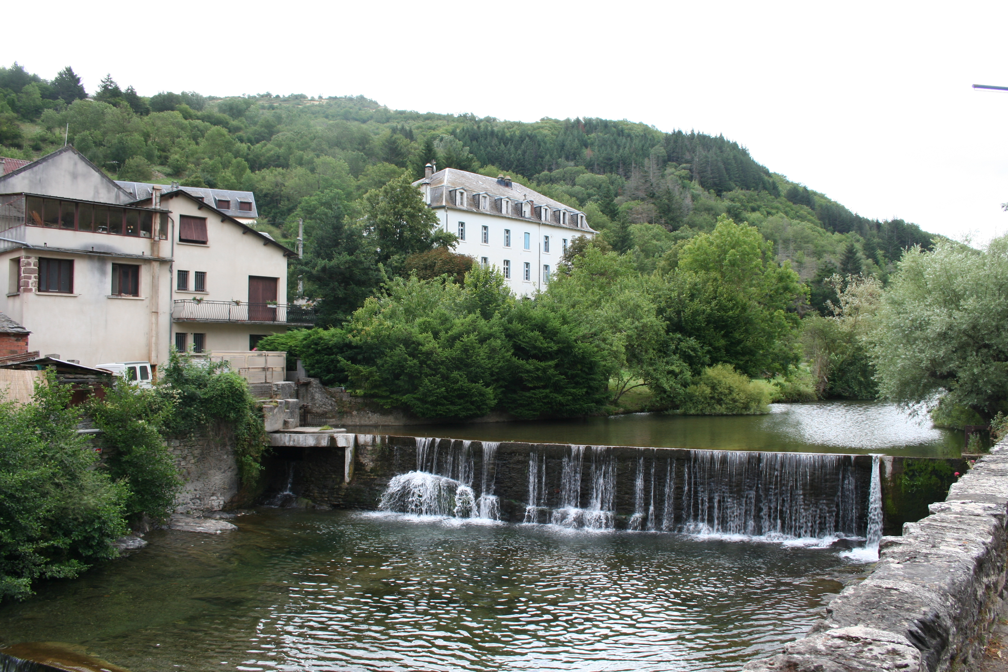 Brusque (Aveyron) - le Dourdou à Brusque.